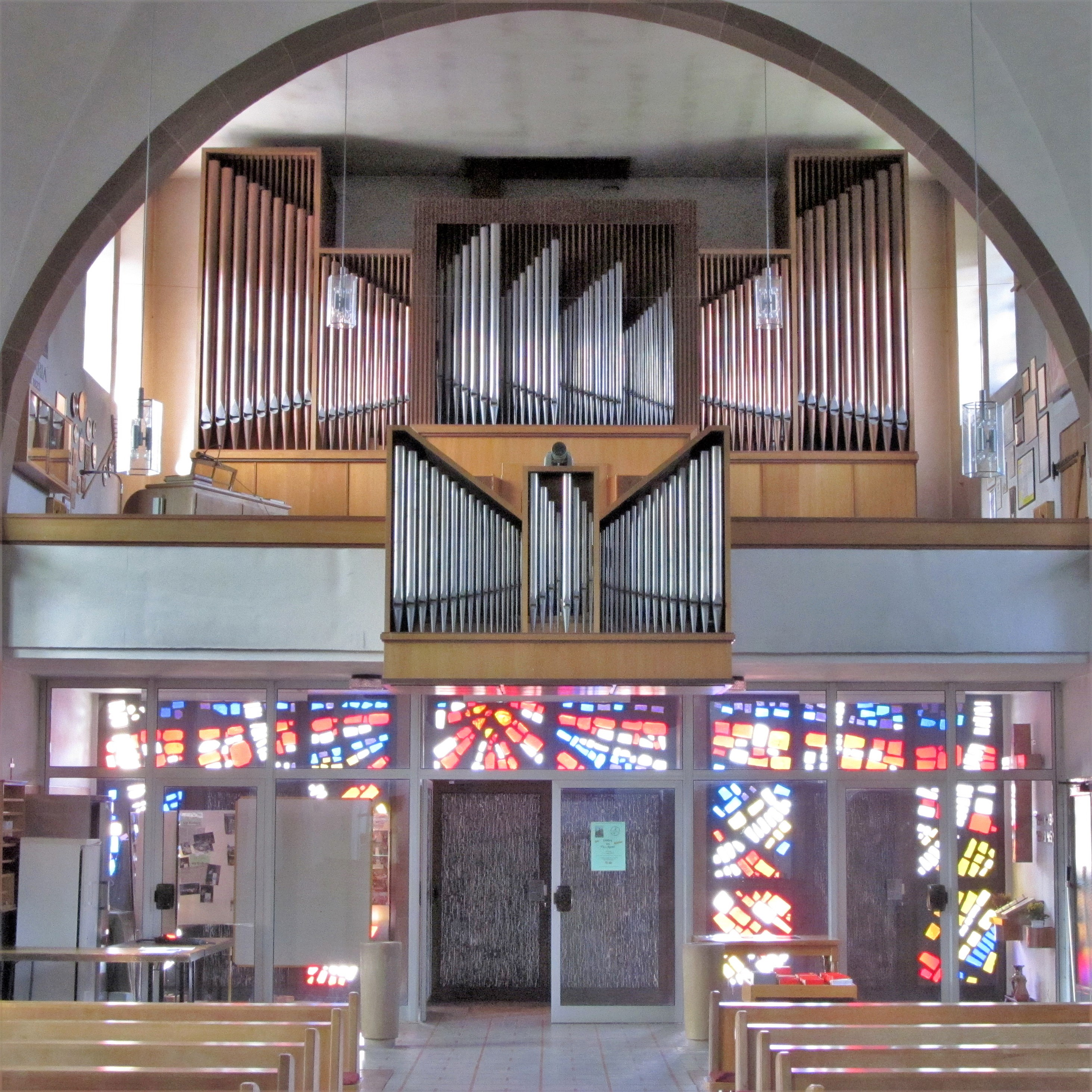 Orgelempore der katholischen Pfarr- und Wallfahrtskirche Mariä Himmelfahrt in Kirrberg, Saarland